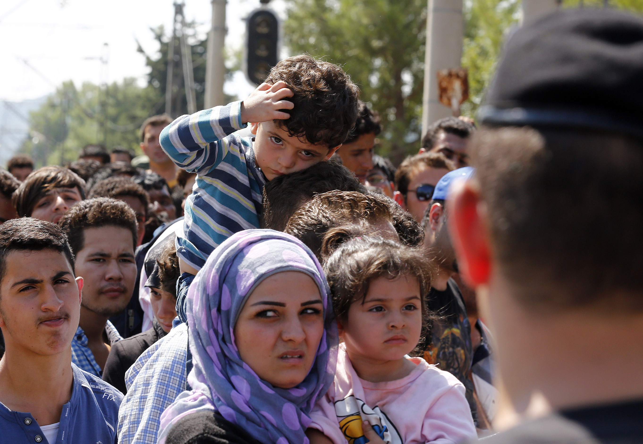 Arbeitsbesuch von Bundesminister Sebastian Kurz in Mazedonien. Besuch der Flüchtlingsströme am Grenzübergang Gevgelija. Mazedonien, 24.08.2015, Foto: Dragan Tatic